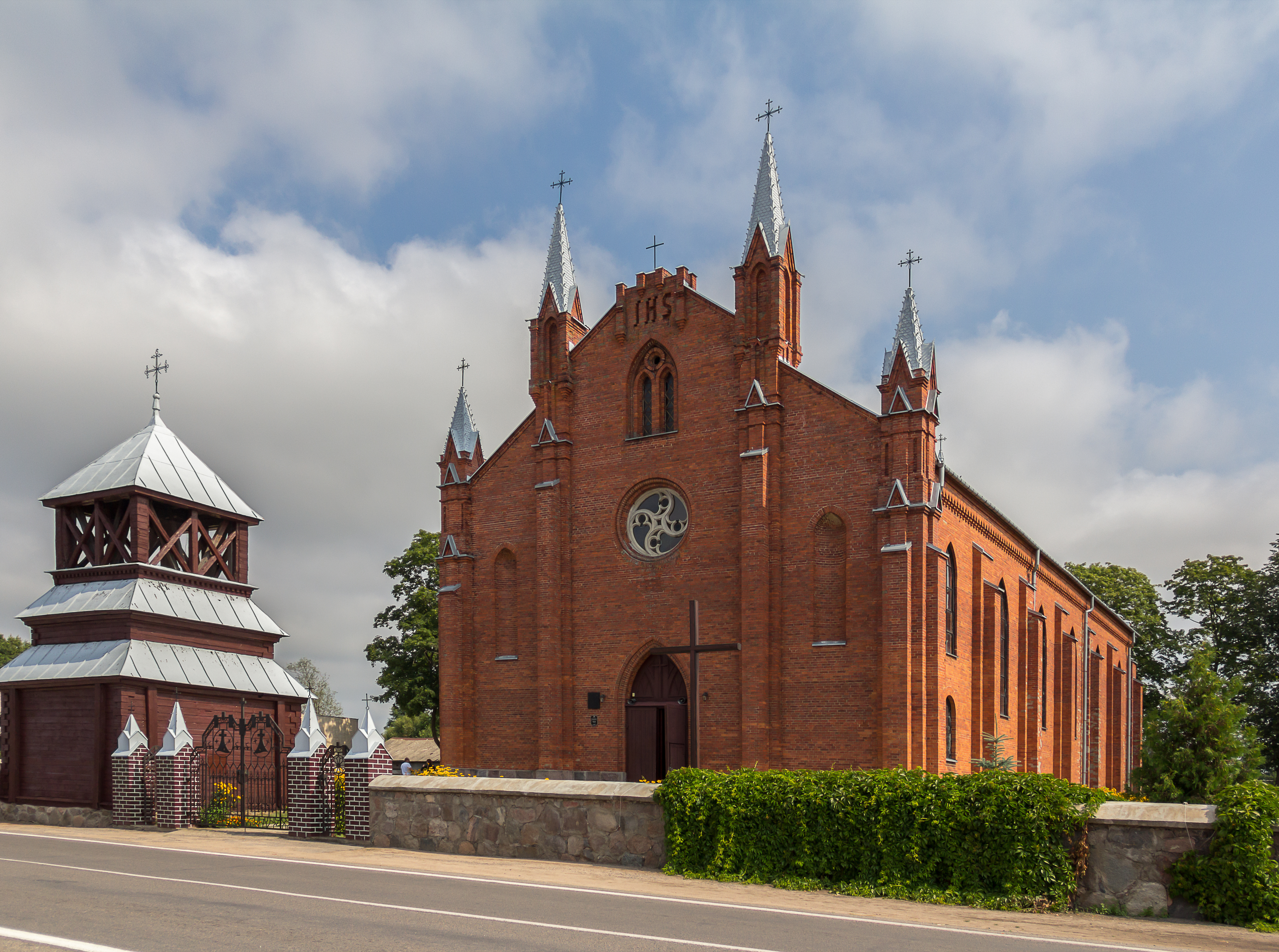 Kościół św. Andrzeja Apostoła i dzwonnica w Naroczy (dawnym Kobylniku). Беларуская (тарашкевіца): Андрэеўскі касьцёл і званіца. в. Нарач This is a photo of Belarusian heritage monument. Reference number: 612Г000443 ( WLM)